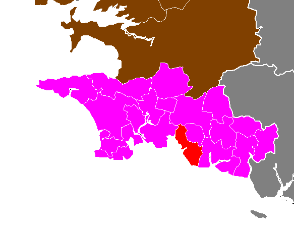 Maps of arrondissements and cantons of France: Arrondissement de Quimper - Canton de Concarneau.PNG (Département du Finistère , Arrondissement de Quimper)